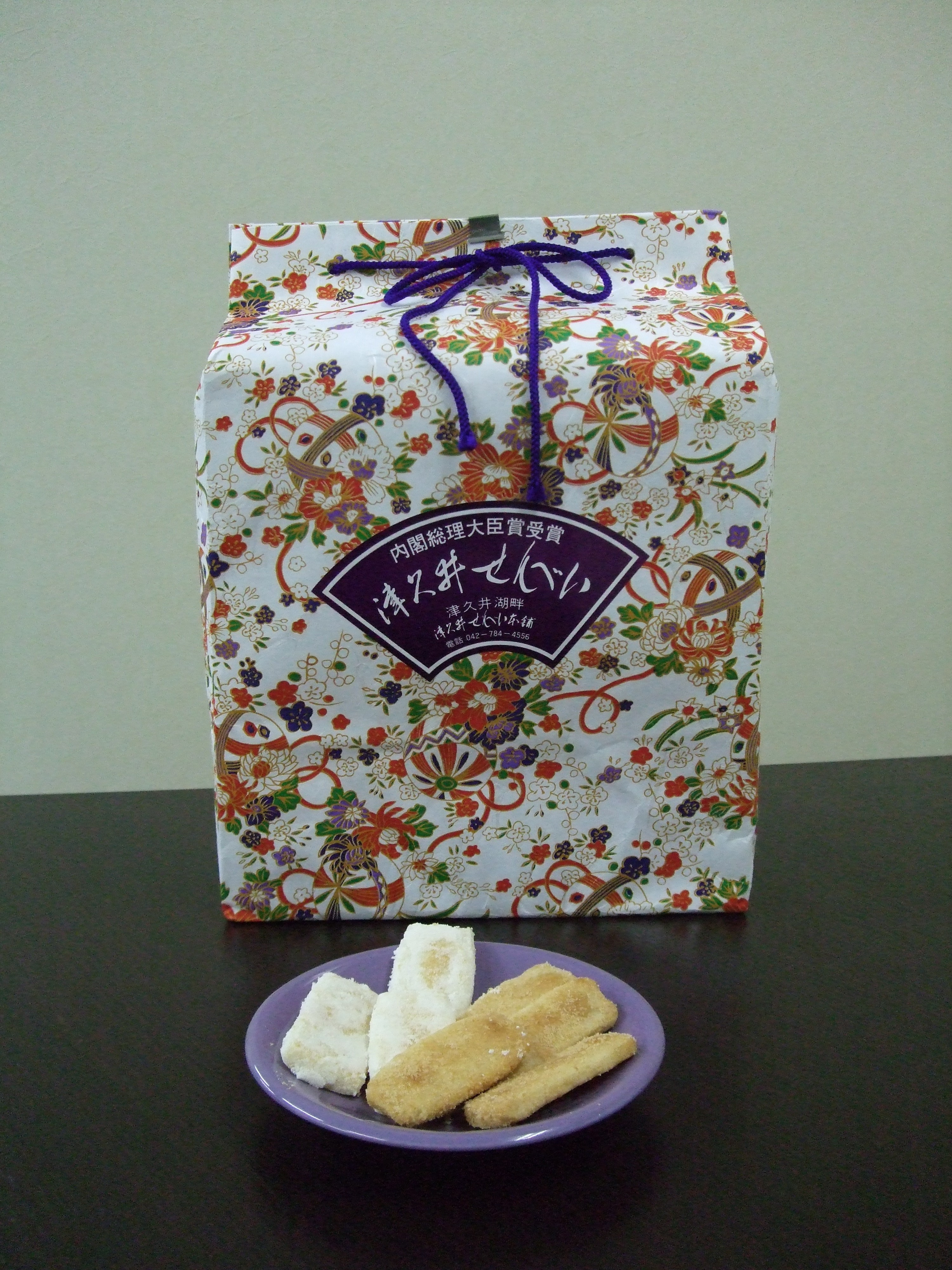 Tsukui-senbei